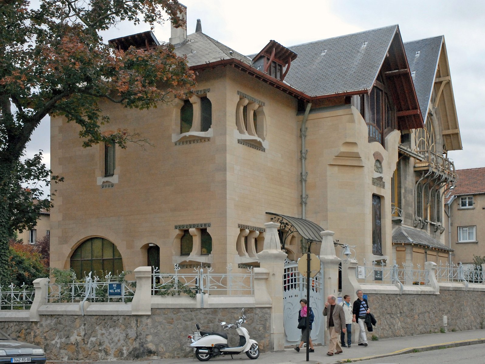 La villa Majorelle a été commandée en 1898 par Louis Majorelle (1859-1926) , elle a été construite de 1900 à 1901, par Lucien Weissenburger (1860-1929) , architecte d' exécution à Nancy, d' après des plans d' Henri Sauvage (1873-1932) , architecte à Paris et gendre d'Alexandre Charpentier, artiste art nouveau reconnu. Il s'agissait de la maison d'habitation de Louis Majorelle et de sa famille ainsi que de son atelier, situé au dernier étage et disposant d'une très large baie vitrée orientée au nord. Le plancher sur caves en béton armé a été exécuté par l' entreprise nancéienne France Lanord et Bichaton concessionnaire du système Hennebique, également auteur du gros-oeuvre. La céramique a été exécutée par Alexandre Bigot (1872 1927) fabricant à Mer (41). L'ébénisterie et les ferronneries ont été conçues et réalisées par l' entreprise nancéienne de Louis Majorelle. Les verrières sont de Jacques Gruber (1870 1936) ; Le décor a été peint par Francis Jourdain (1876 1958) peintre à Paris et Henri Royer (1869 1938) peintre à Nancy. La villa Majorelle est occupée par les services du ministère de la culture (SDAP) et n'est visitable que le week-end sur rendez-vous à prendre au musée de l'Ecole de Nancy. Les photos sont interdites à l'intérieur. Seule la partie gauche de la villa a été restaurée. Les ajouts et modifications effectués par les services de l'Equipement, bien avant son classement en 1996 comme monument historique, n'ont pas été supprimés à ce jour mais il semble que le projet complet de restauration soit envisagé.